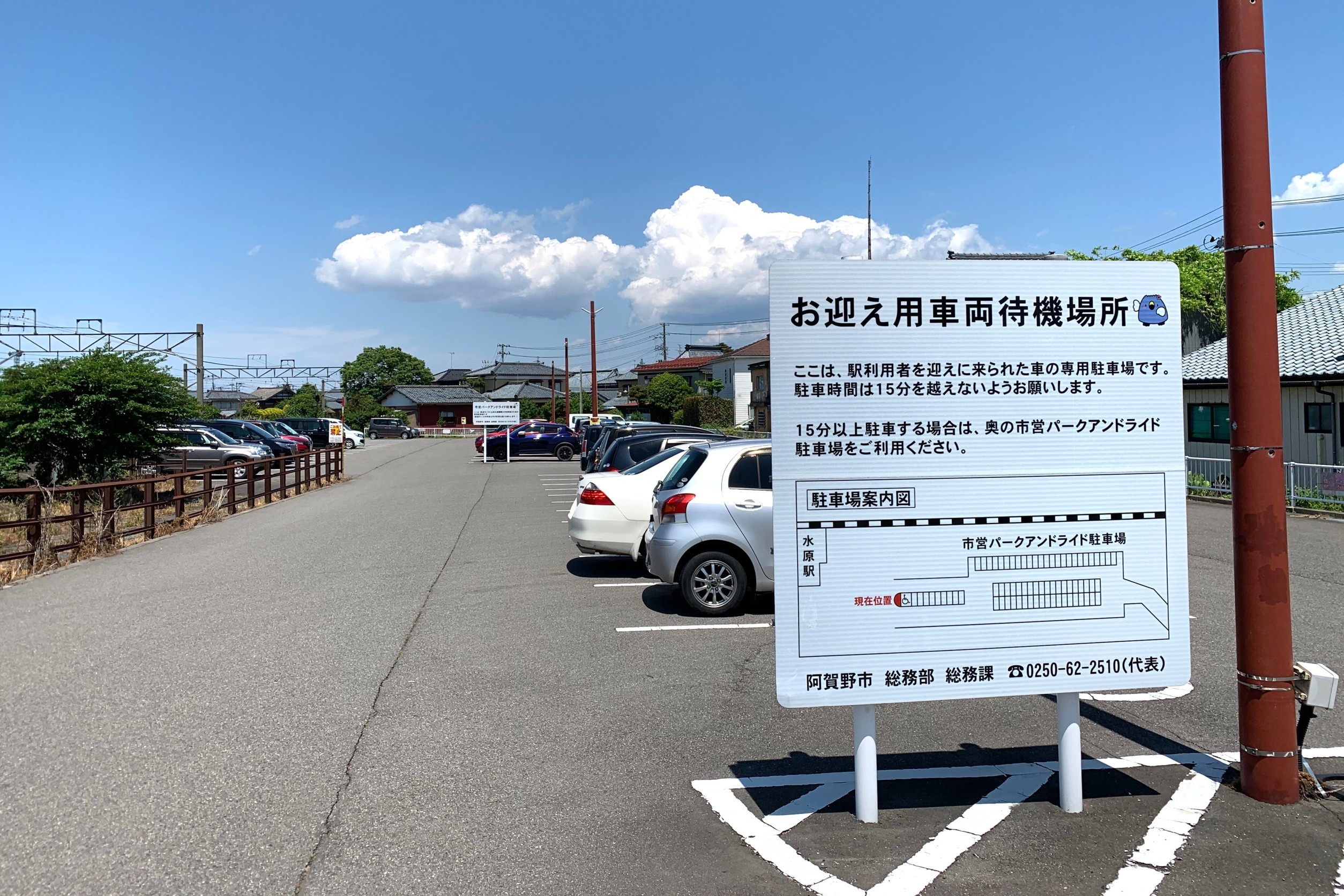 羽越本線水原駅のキスアンドライド用待機場所（2020年5月）奥にはパークアンドライド用無料駐車場もある。